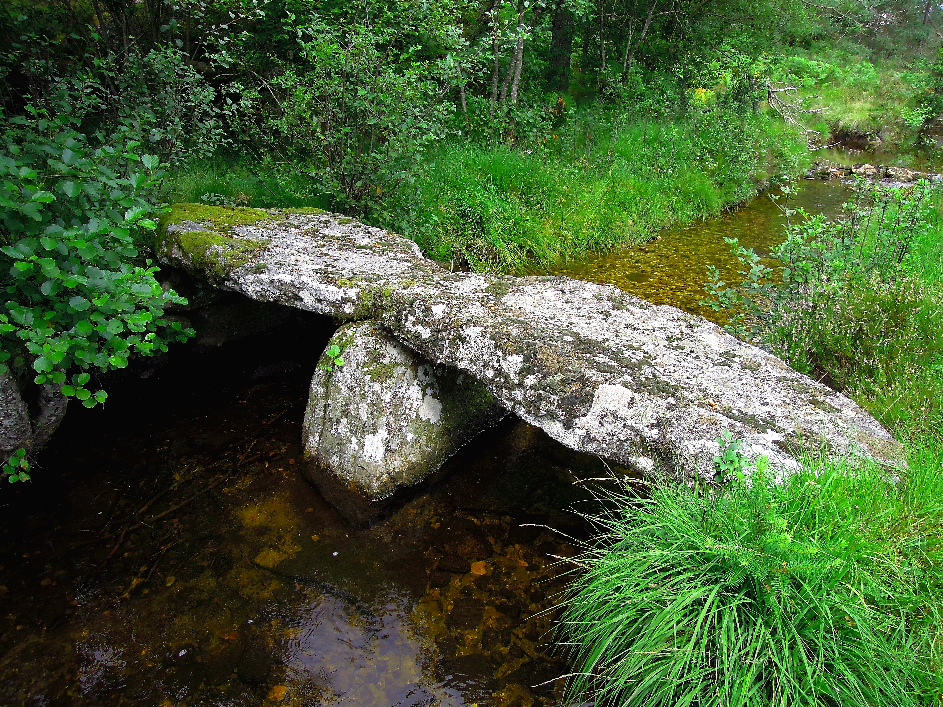 le pont des pierres plates, plateau de Millevaches, Corrèze, France